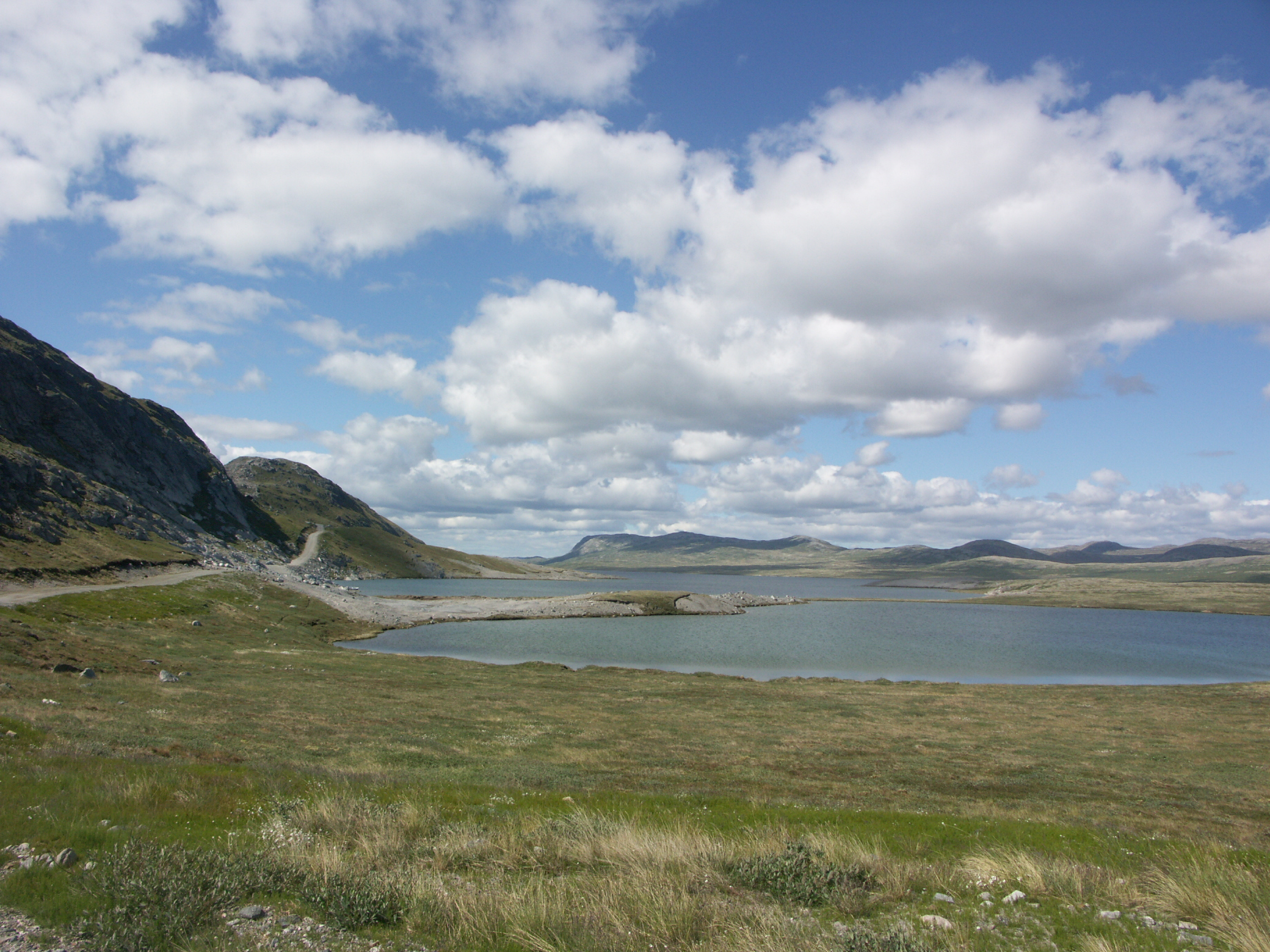 Aajuitsup Tasia lake, Qeqqata, Greenland